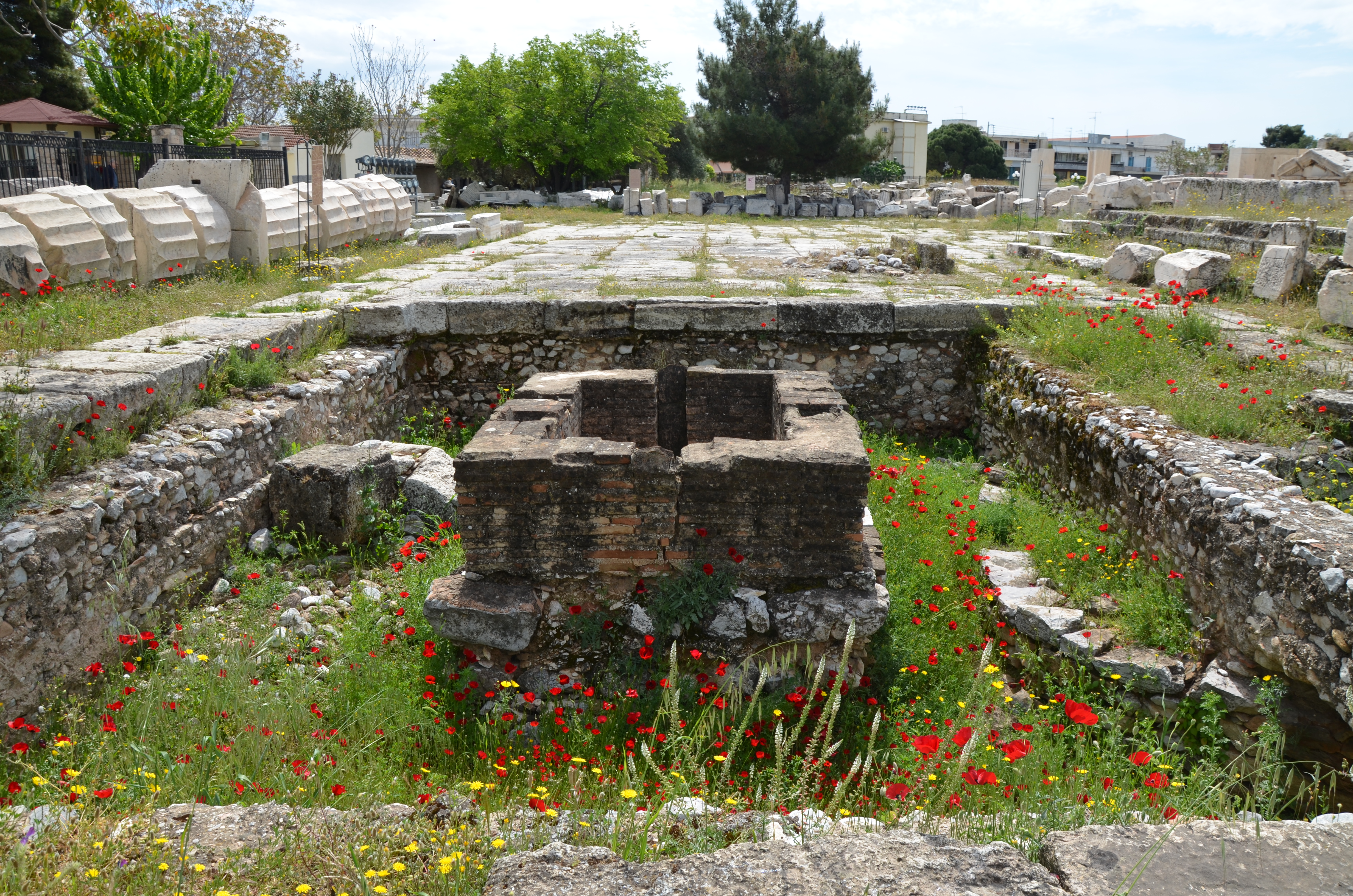 Eleusis